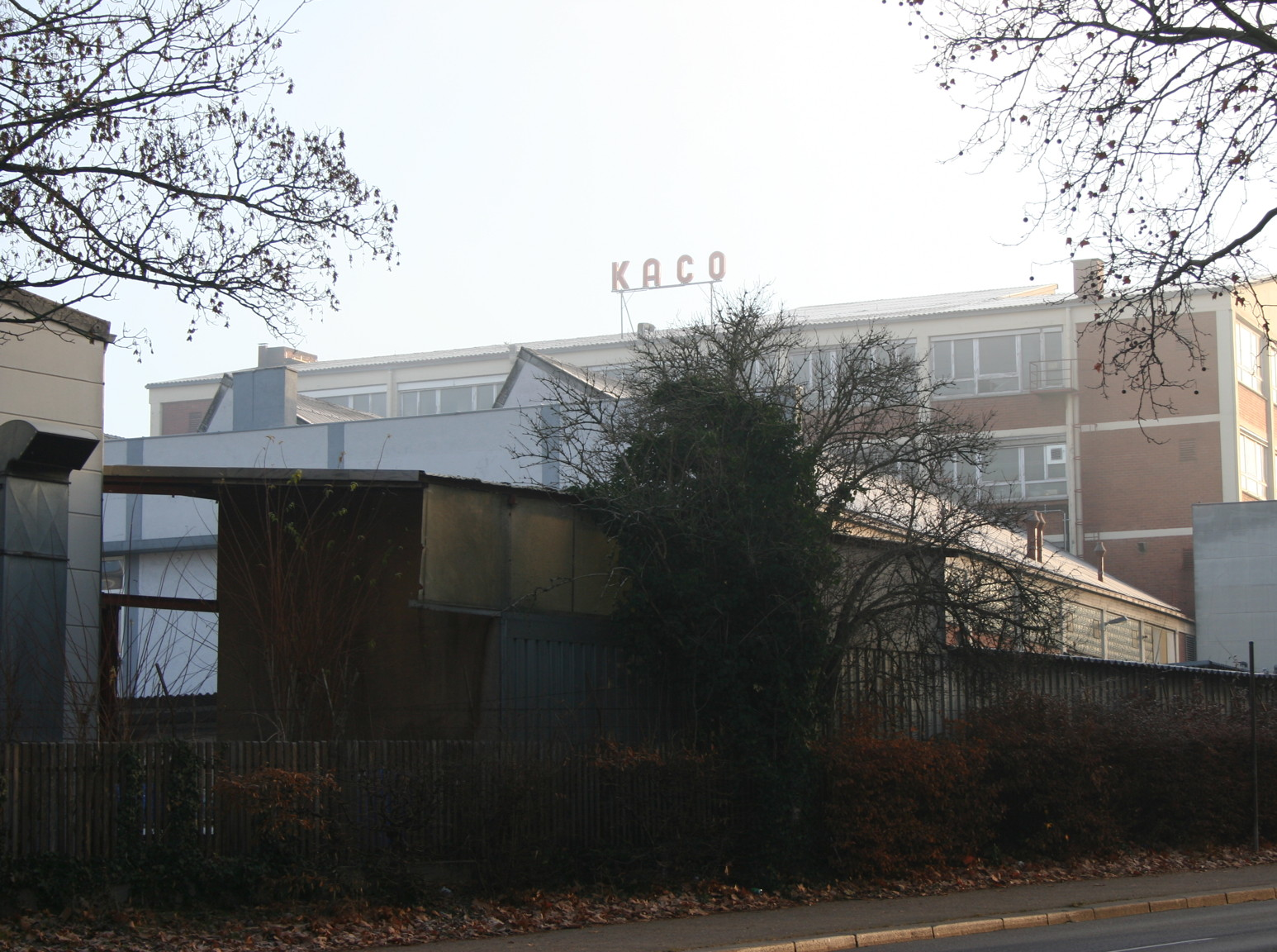 KACO plant Germany